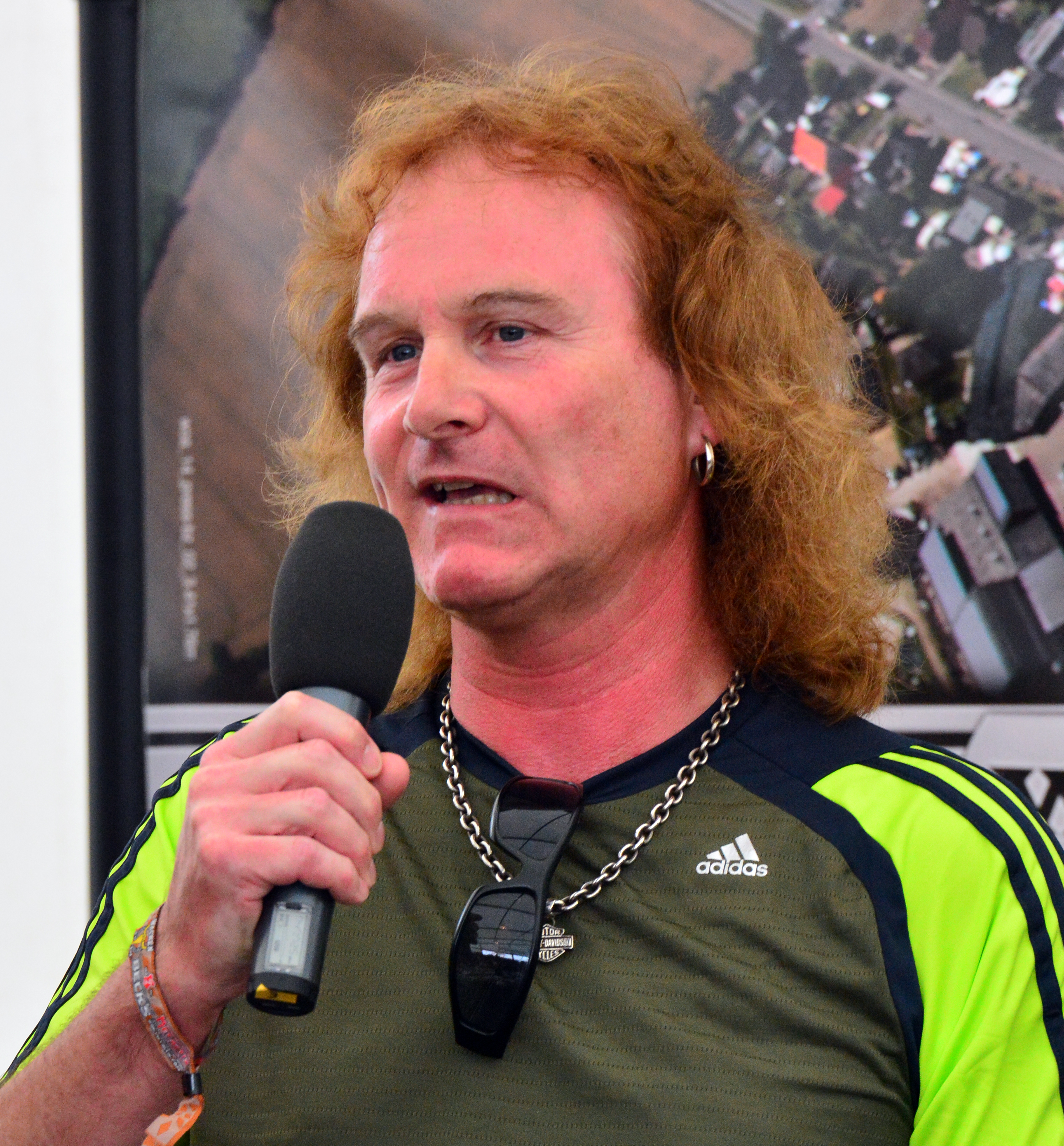 Rolf Kaspareck von Runnig Wild bei einer Pressekonferenz beim Wacken Open Air 2014